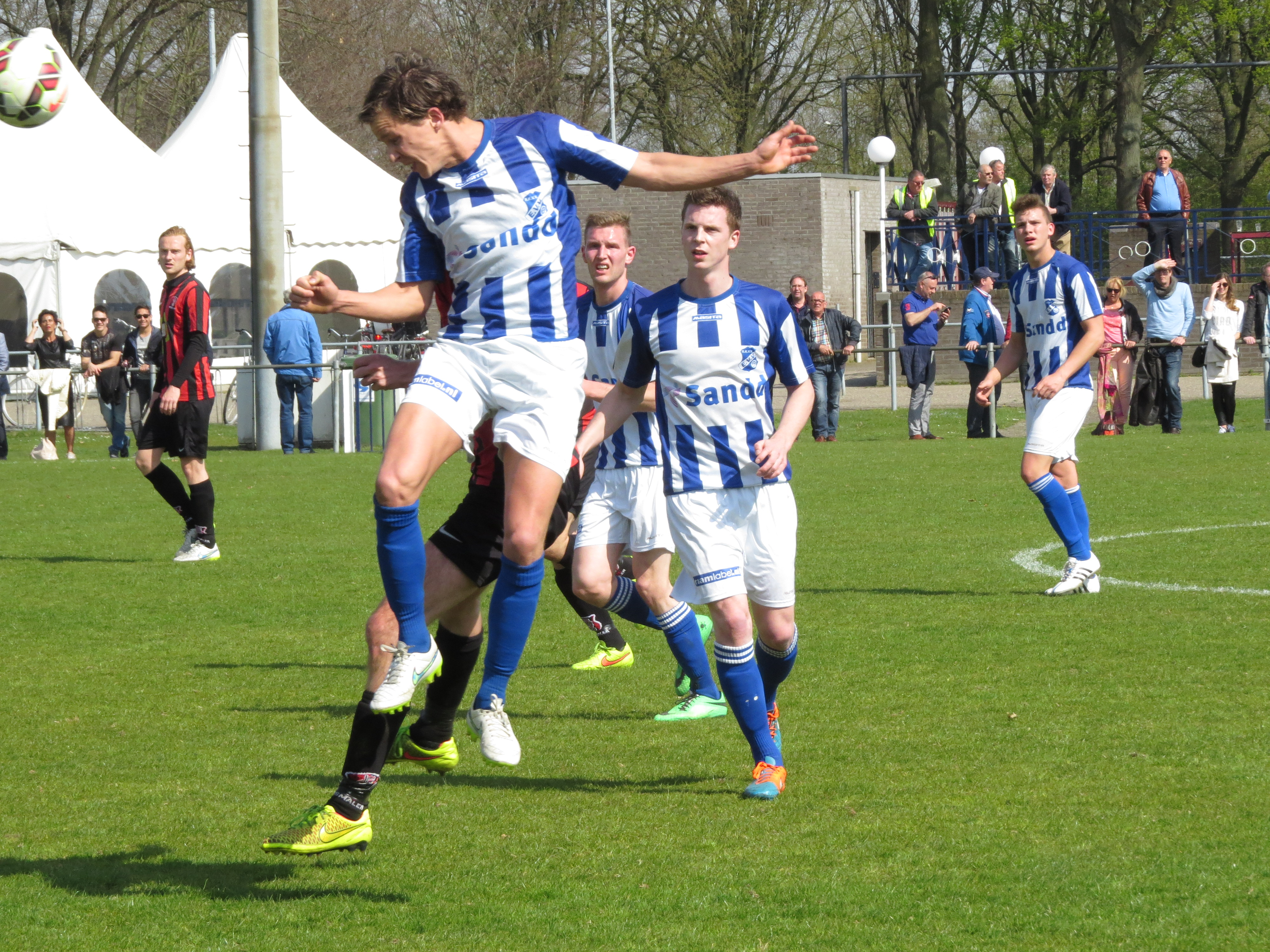 Joey hier nog in actie voor topklasser EVV Echt in April 2015